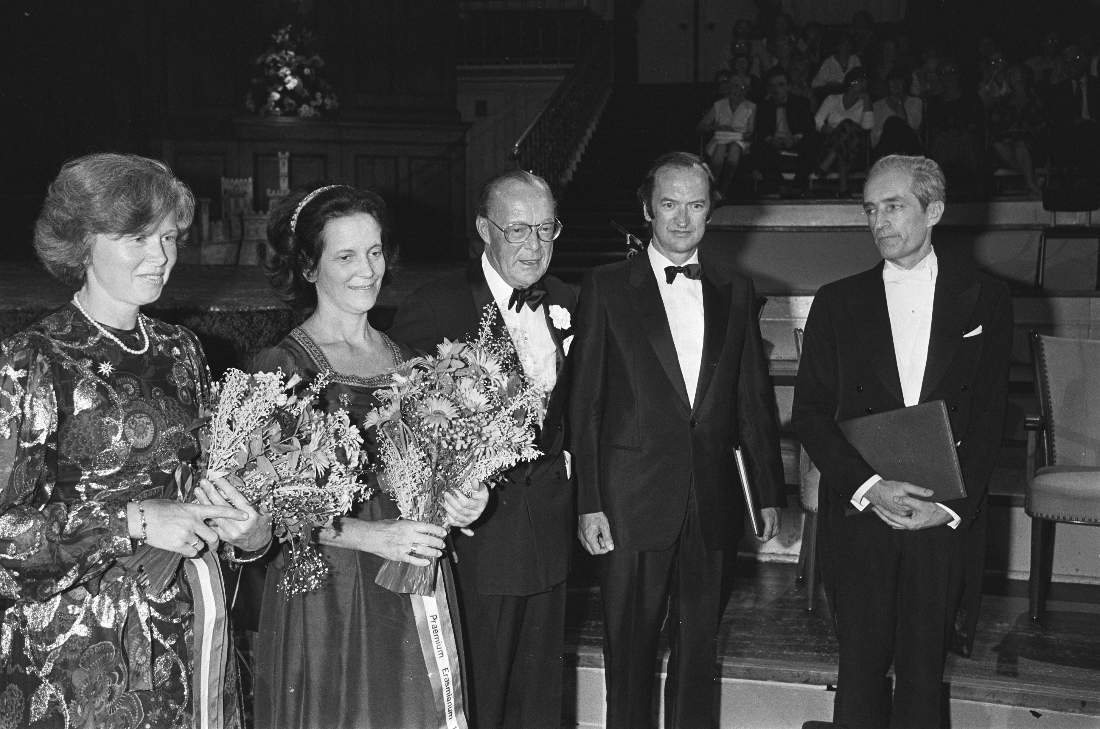 Prins Bernhard heeft in Amsterdam Erasmusprijs 1980 uitgereikt. In Concertgebouw. V.l.n.r. Alice Harnoncourt (echtgenote van Nikolaus Harnoncourt), Marie Leonhardt-Amsler (echtgenote van Gustav Leonhardt), prins Bernhard, de laureaat Nikolaus Harnoncourt en laureaat Gustav Leonhardt. Datum 8 september 1980